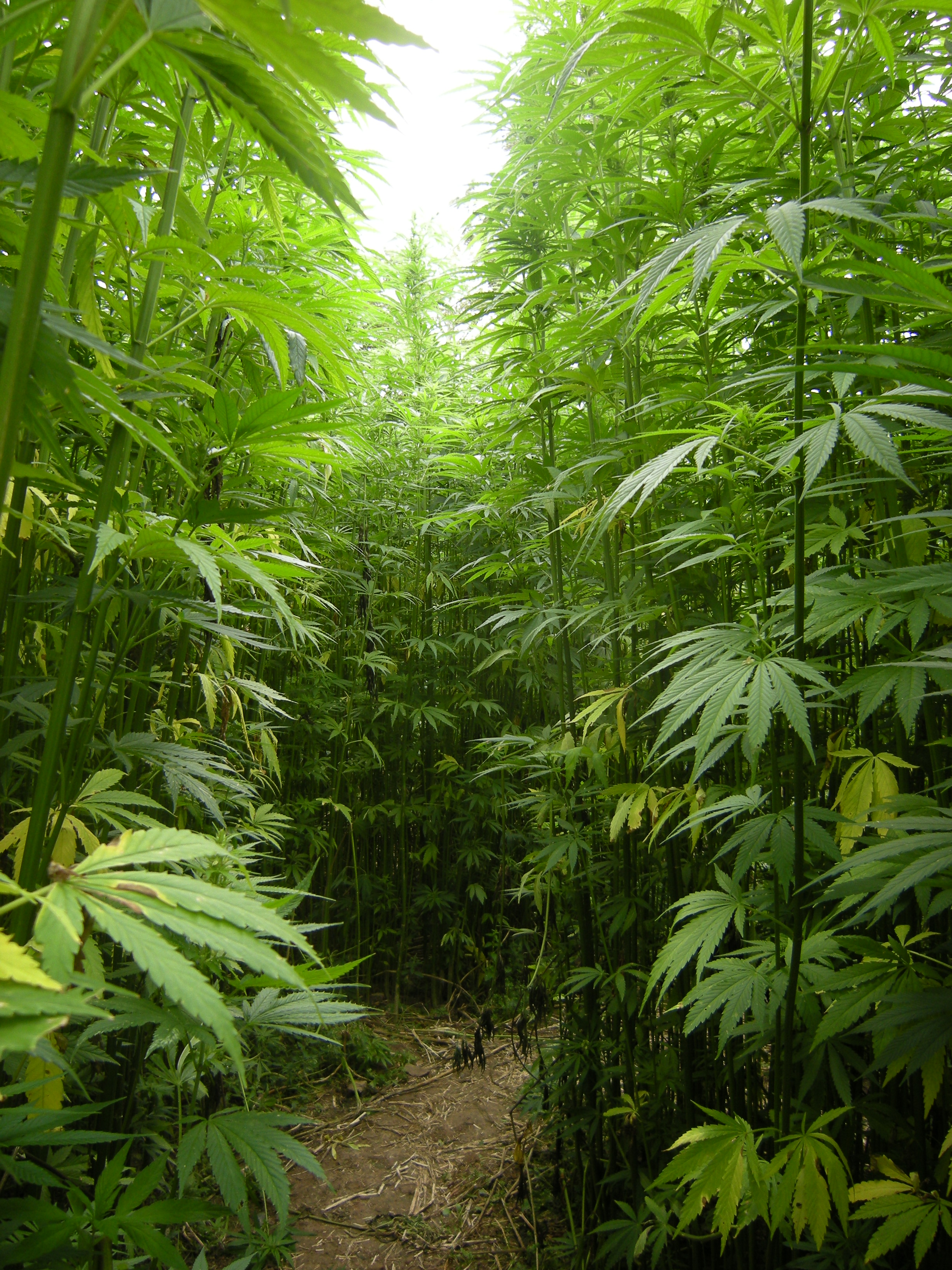 Ploëzal (Côtes-d'Armor, Bretagne, France) : Labyrinthe de chanvre au château de la Roche-Jagu.